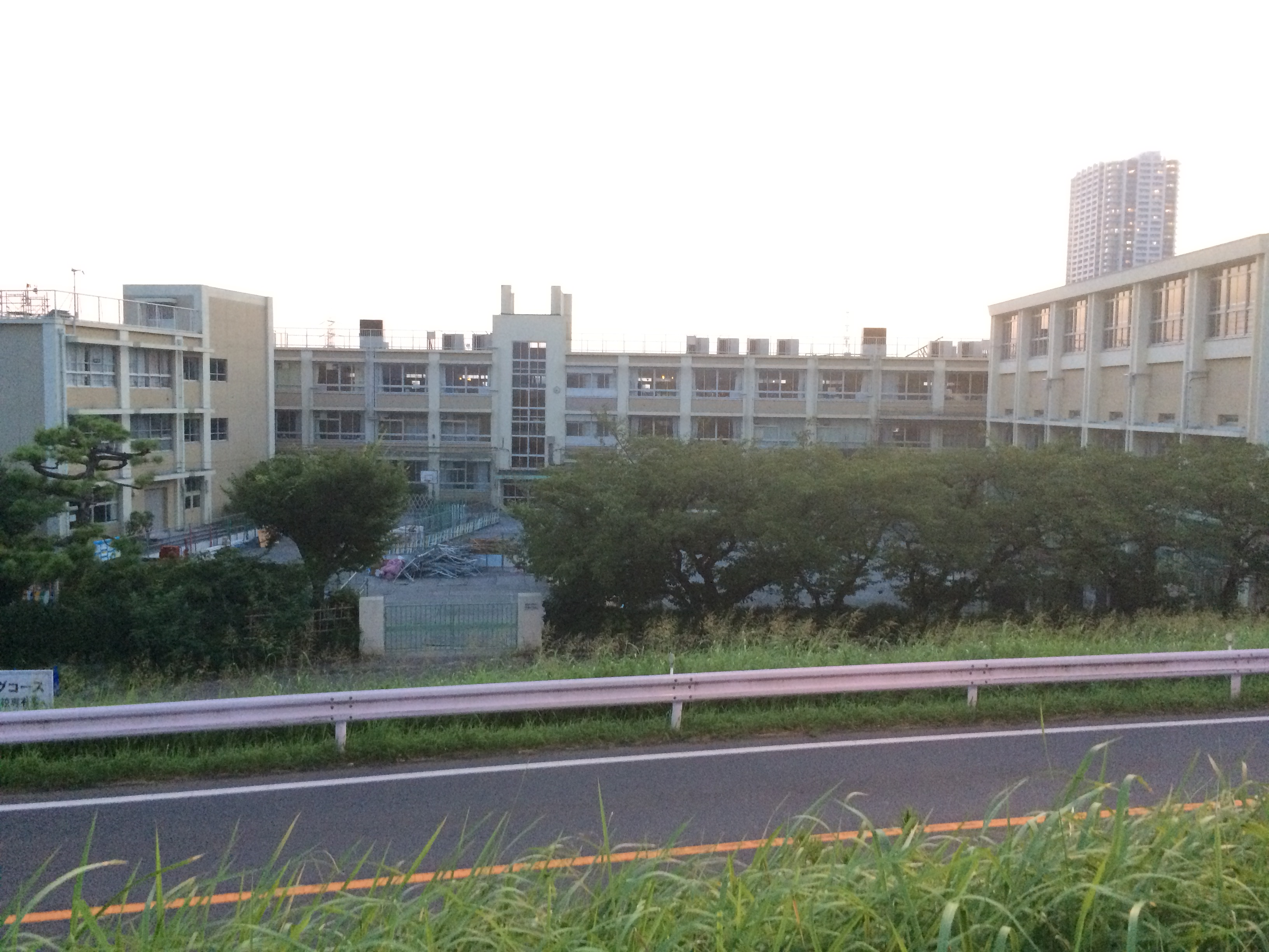 江戸川の土手から葛飾区立金町小学校の校舎を見下ろす